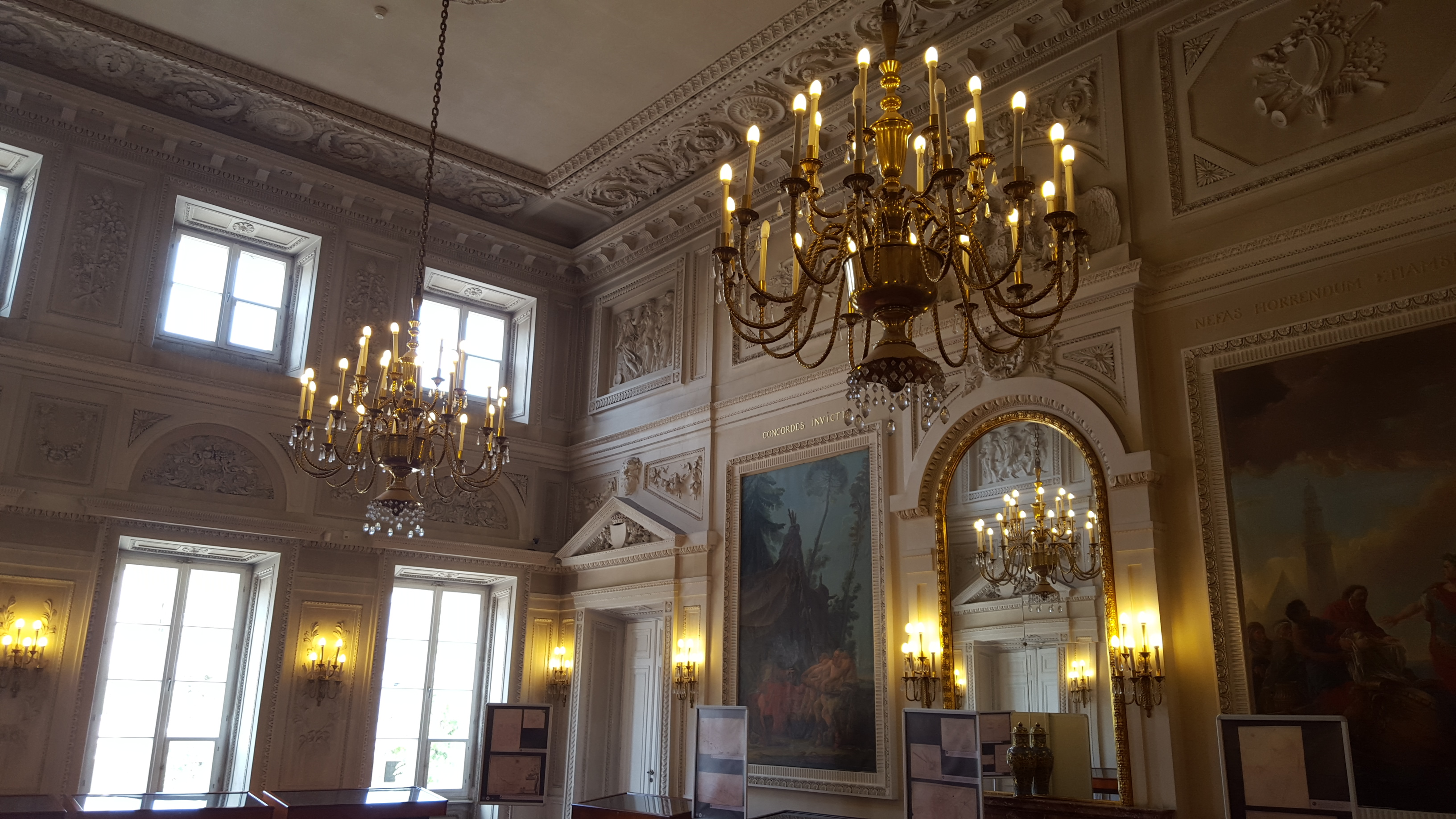 Pałac Raczyńskich w Warszawie - wnętrze